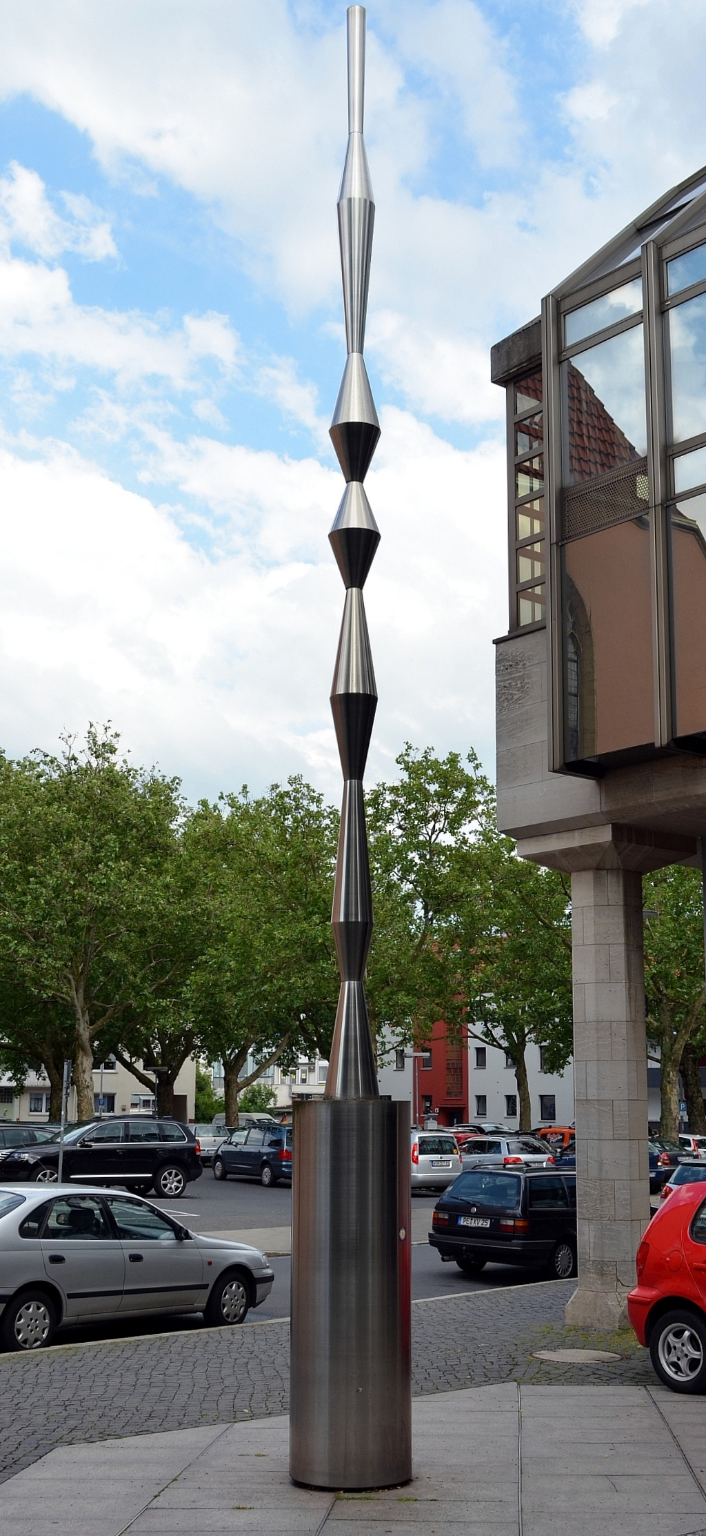 Braunschweig: unbekanntes Kunstwerk (?) Lindentwete, Ecke Schützenstrasse